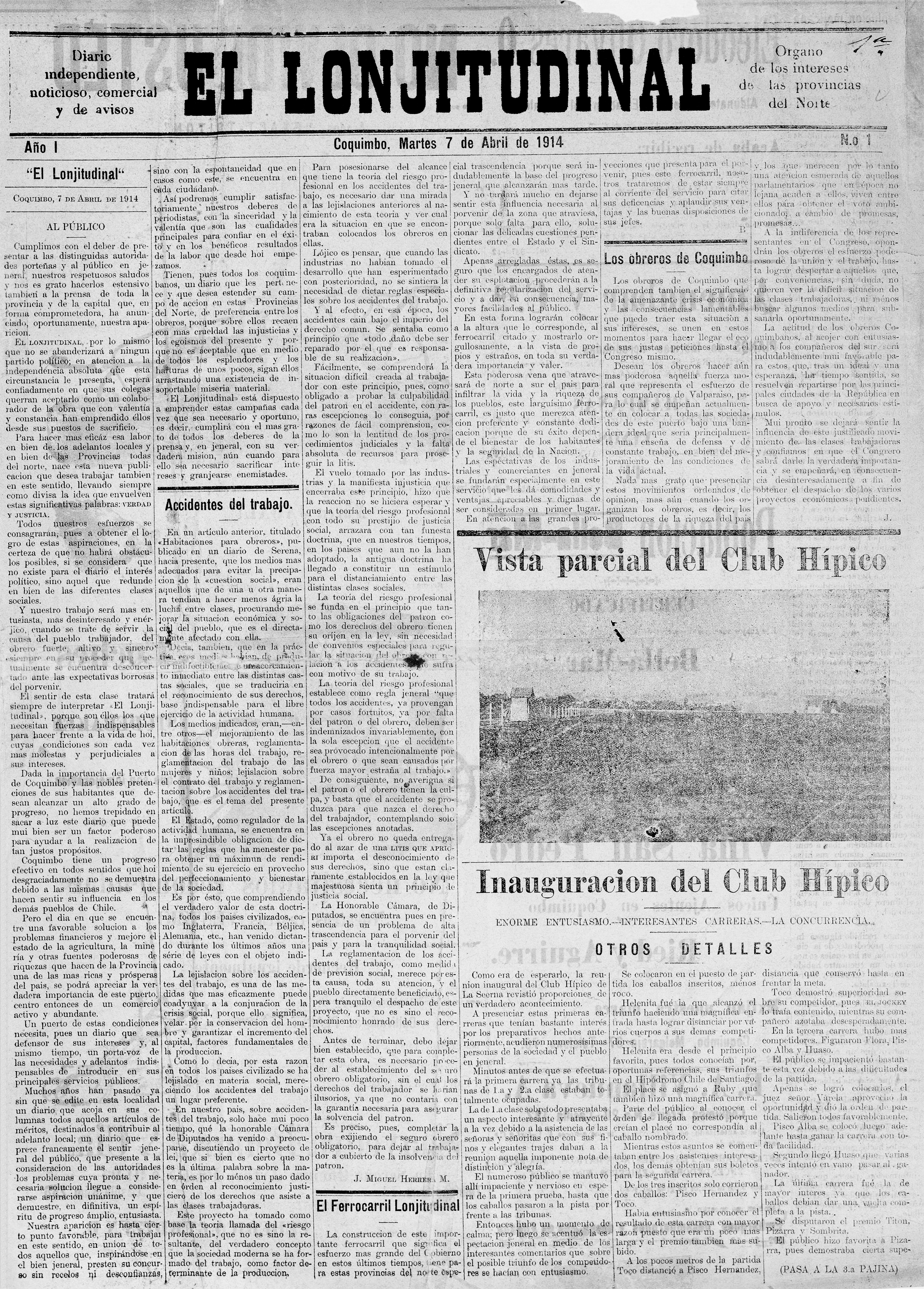 Portada del primer número de El Lonjitudinal, 7 de abril de 1914